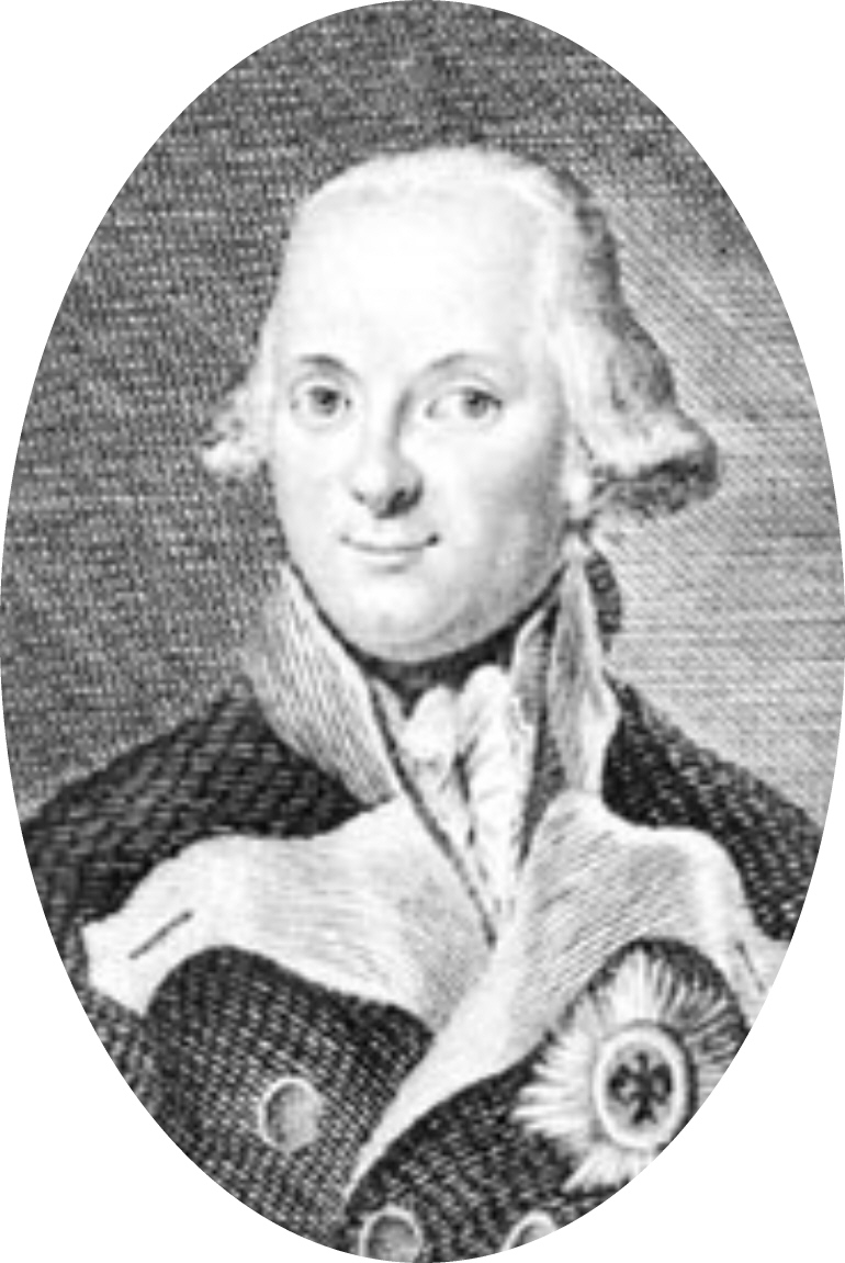 Friedrich Ludwig, prince of Hohenlohe-Ingelfingen (1746-1818)